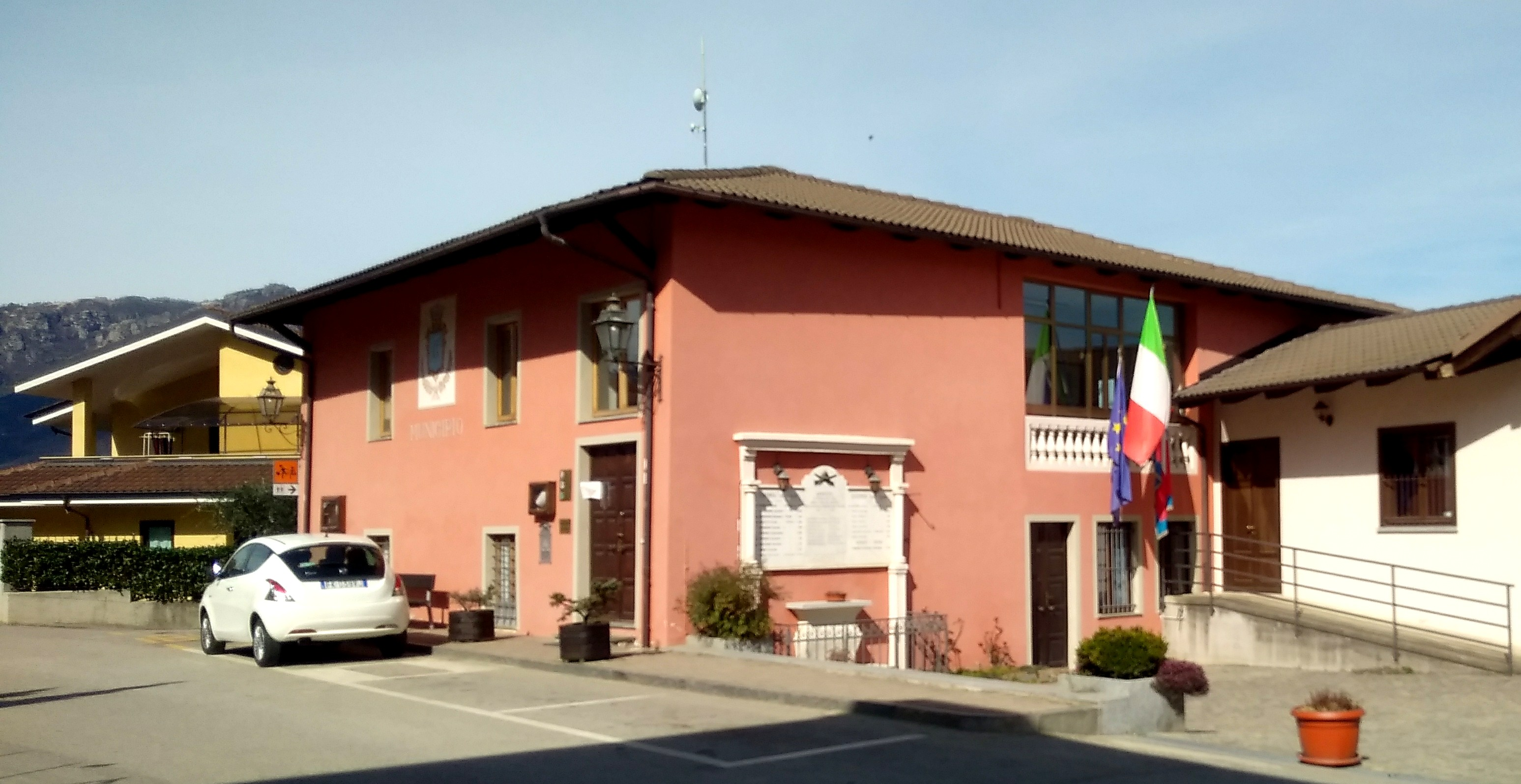 Gambasca (CN): municipio